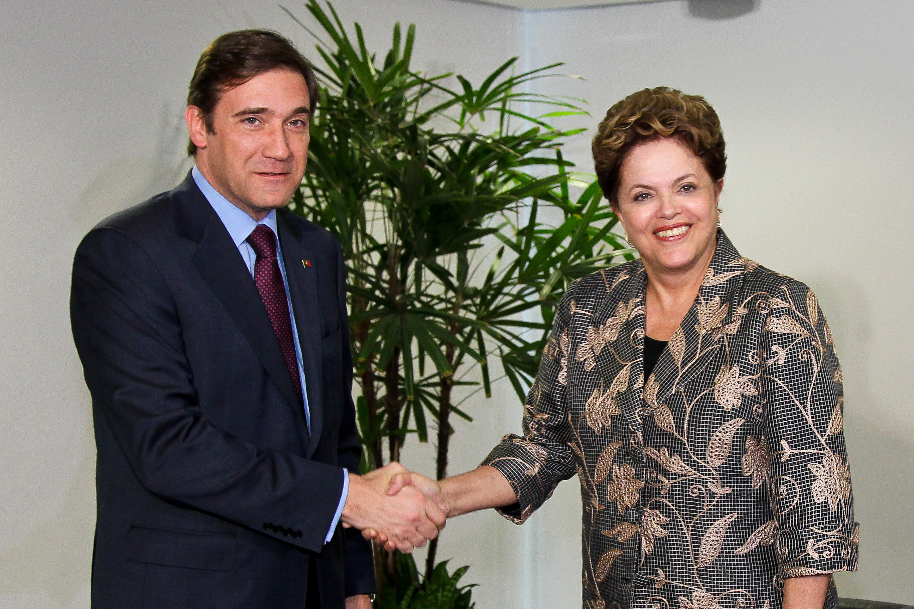 Presidenta Dilma Rousseff durante encontro com o senhor Pedro Passos Coelho, Primeiro-Ministro de Portugal, no Palácio do Planalto. (Brasília - DF, 27/10/2011)